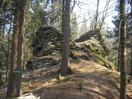 zbytky zříceniny hradu Nístějky